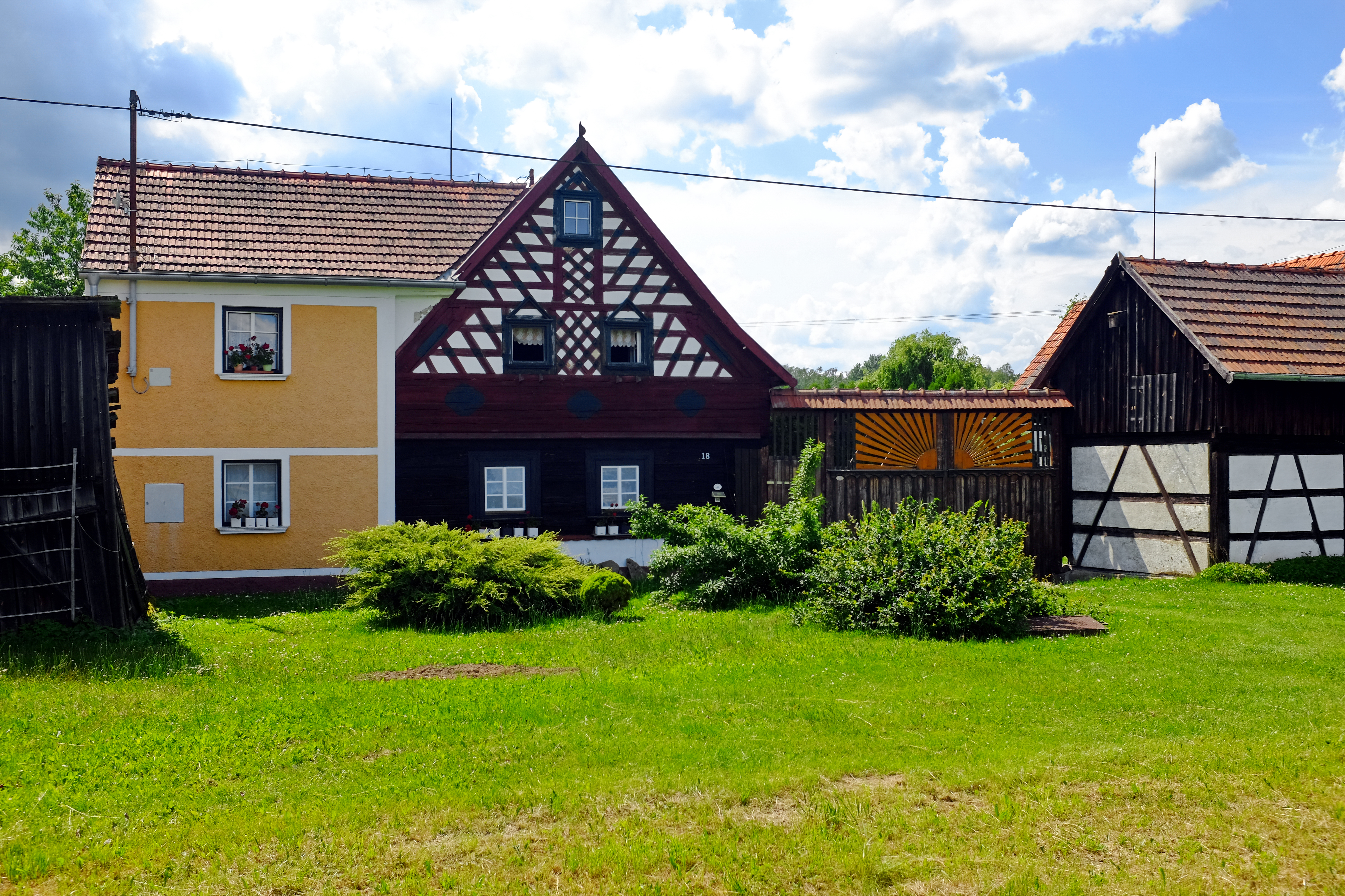 Usedlost čp. 18, Lipová 18, Lipová (okres Cheb).